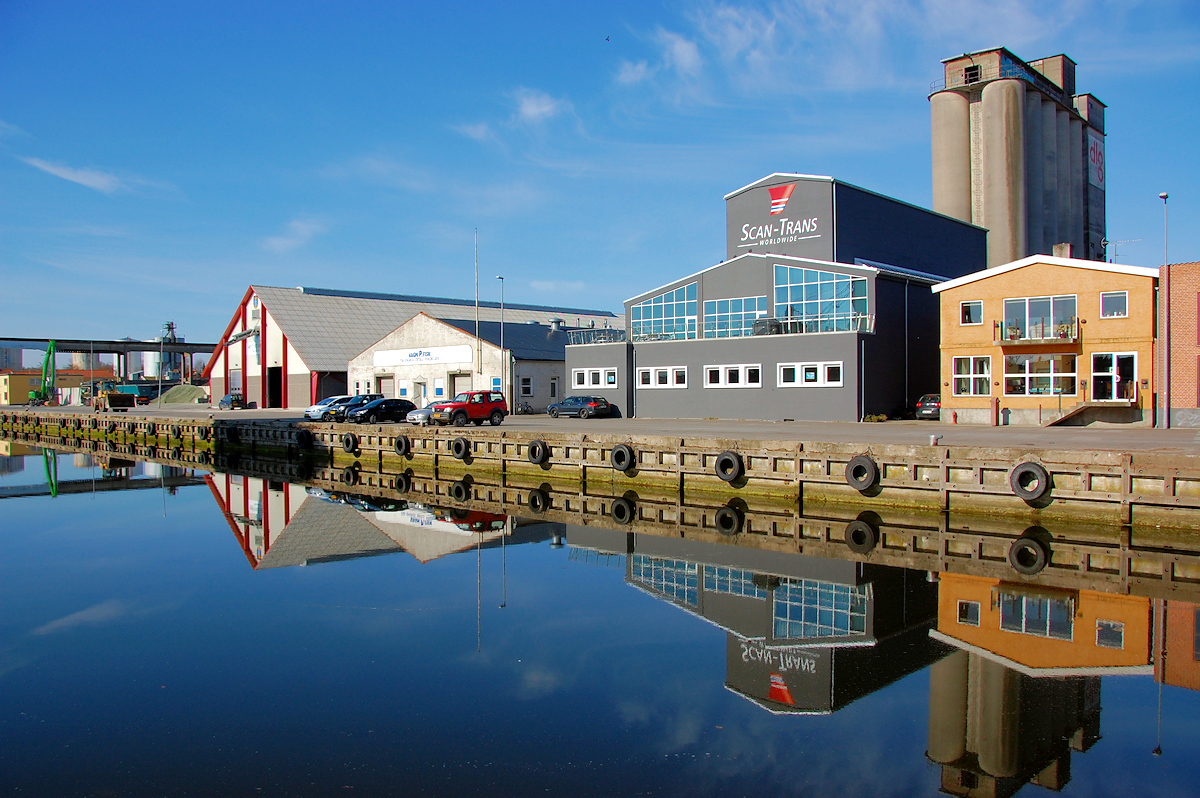 Naestved Harbour [Nikon-d40 NIKKOR-VR-18-200]